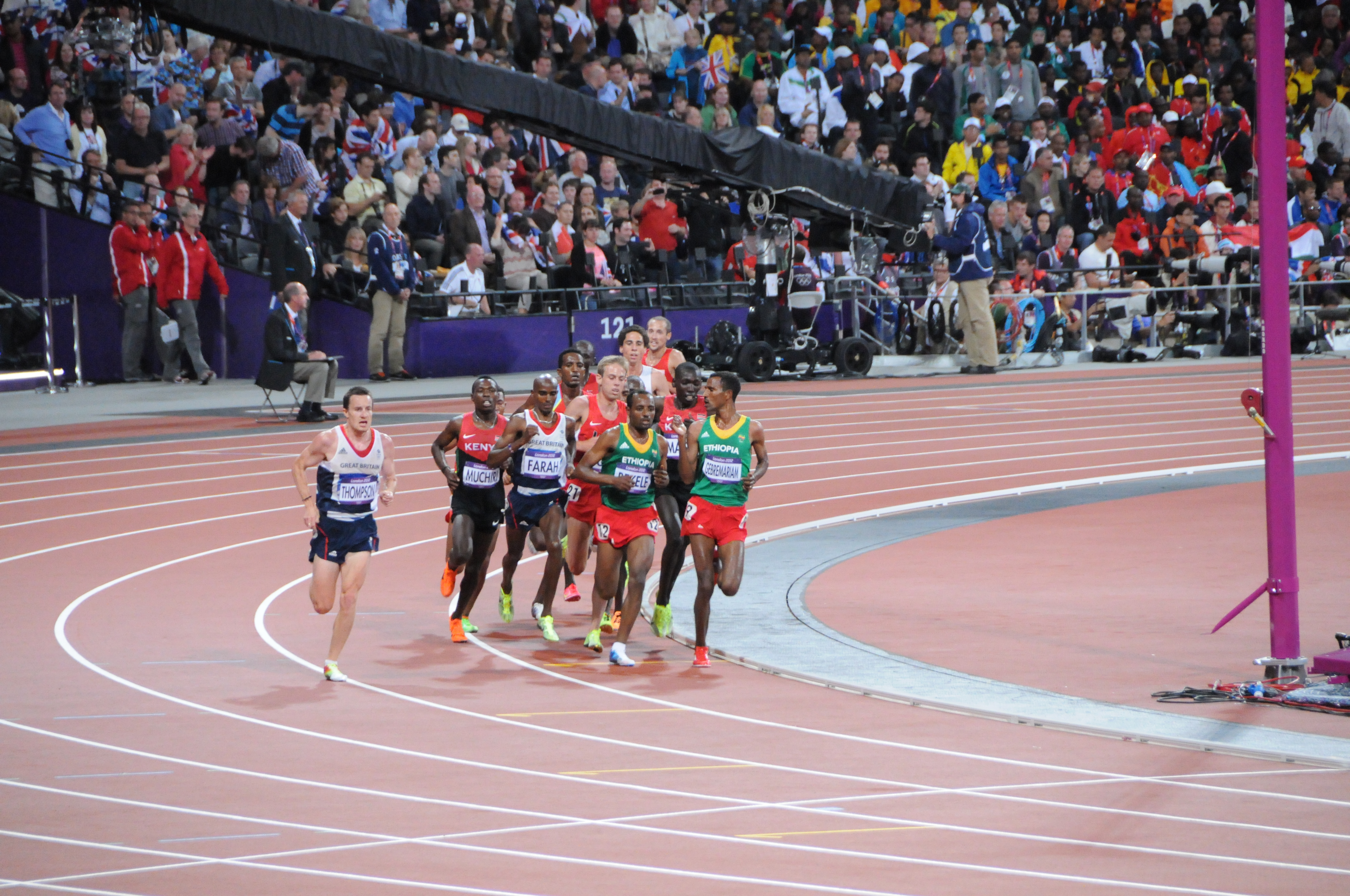 Course du 10000 m au stade olympique de Londres, Christopher Thompson, Bedan Karoki Muchiri, Mo Farah, Galen Rupp, Tariku Bekele, Gebregziabher Gebremariam